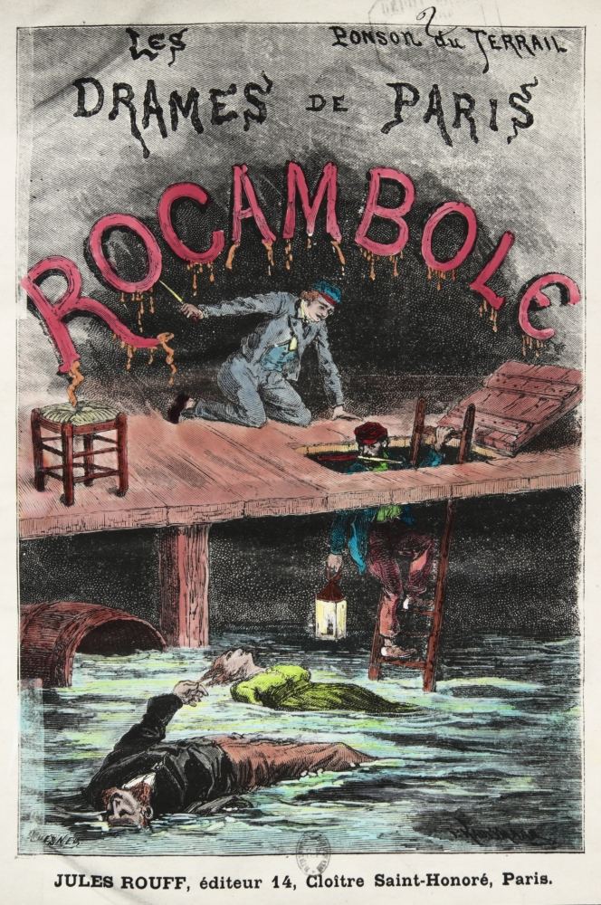 Couverture de Rocambole. Les Drames de Paris de Pierre Alexis Ponson du Terrail, éditions Jules Rouff en 4 volumes, 1884.